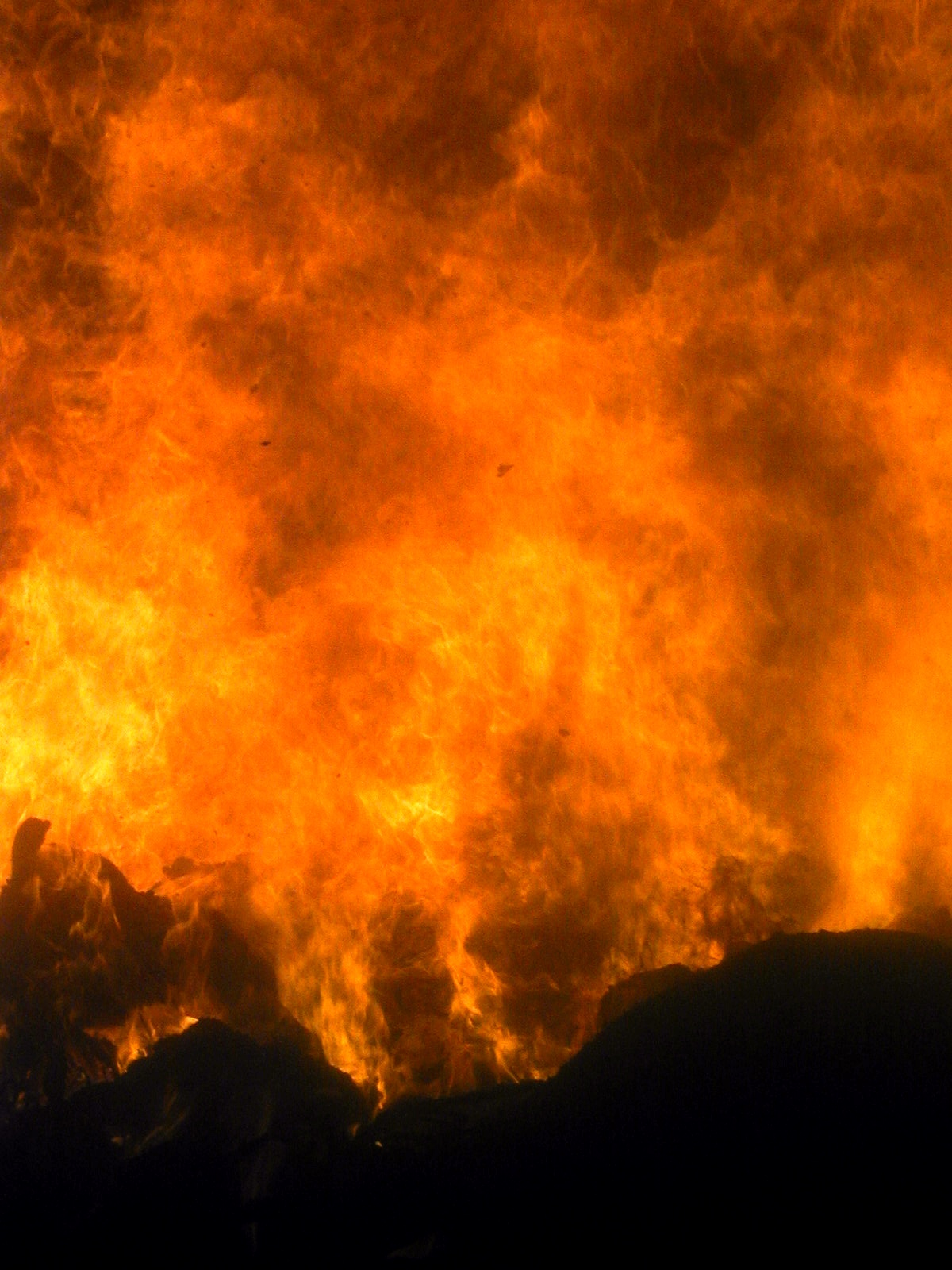 Feuer